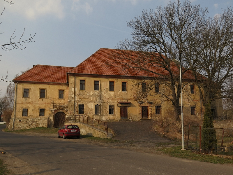 Zámek Zahořany, Zahořany 1, Zahořany (Křešice).